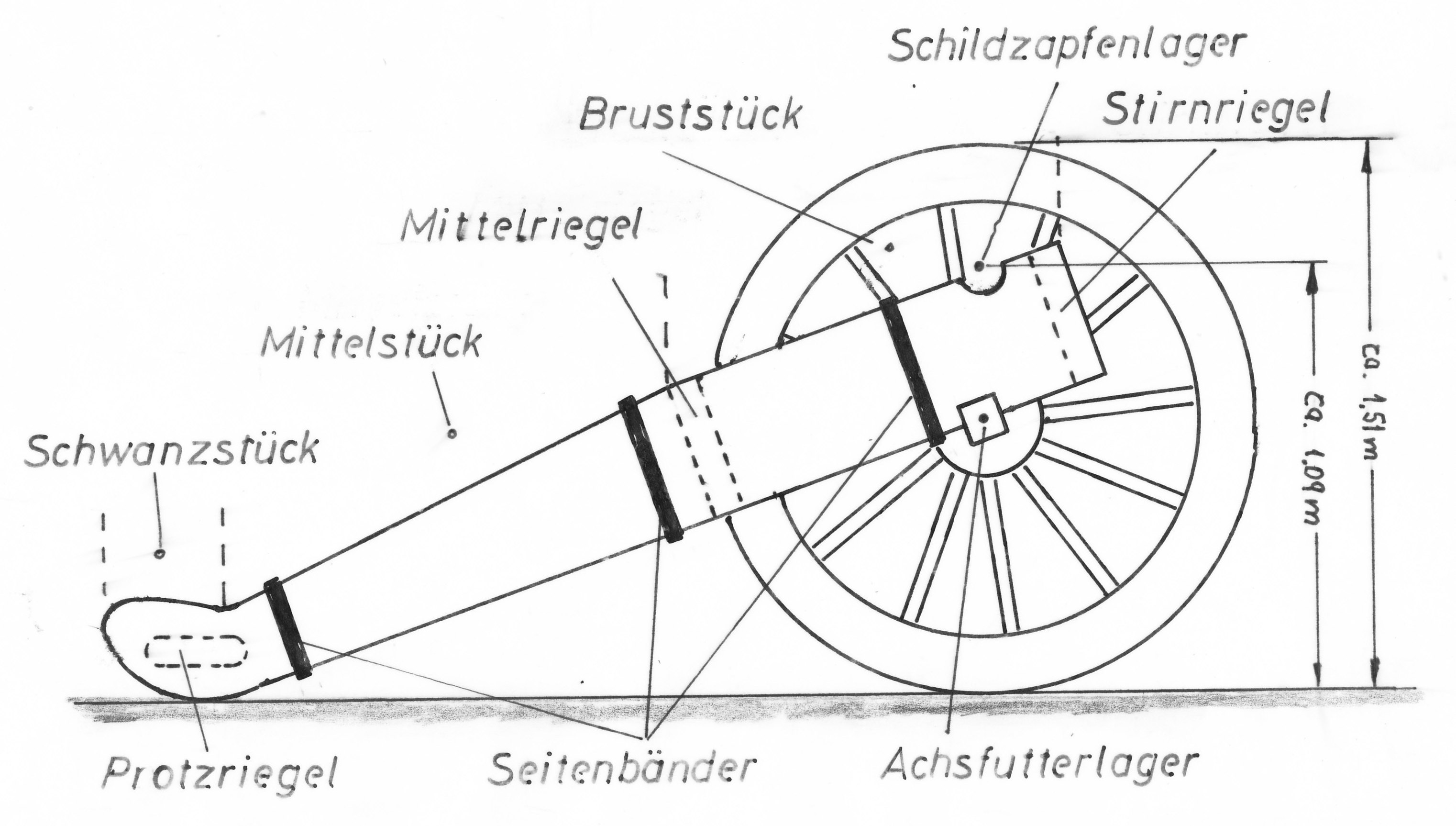 Preußische 6-Pfünder-Feldlaffete C 42/56. Die Vorlage zu diesem Bild stammt aus: W. Hoffmann. Die Elemente der Waffenlehre. Seite 76; Figur 36. Verlag von A. Bath, Berlin 1860.